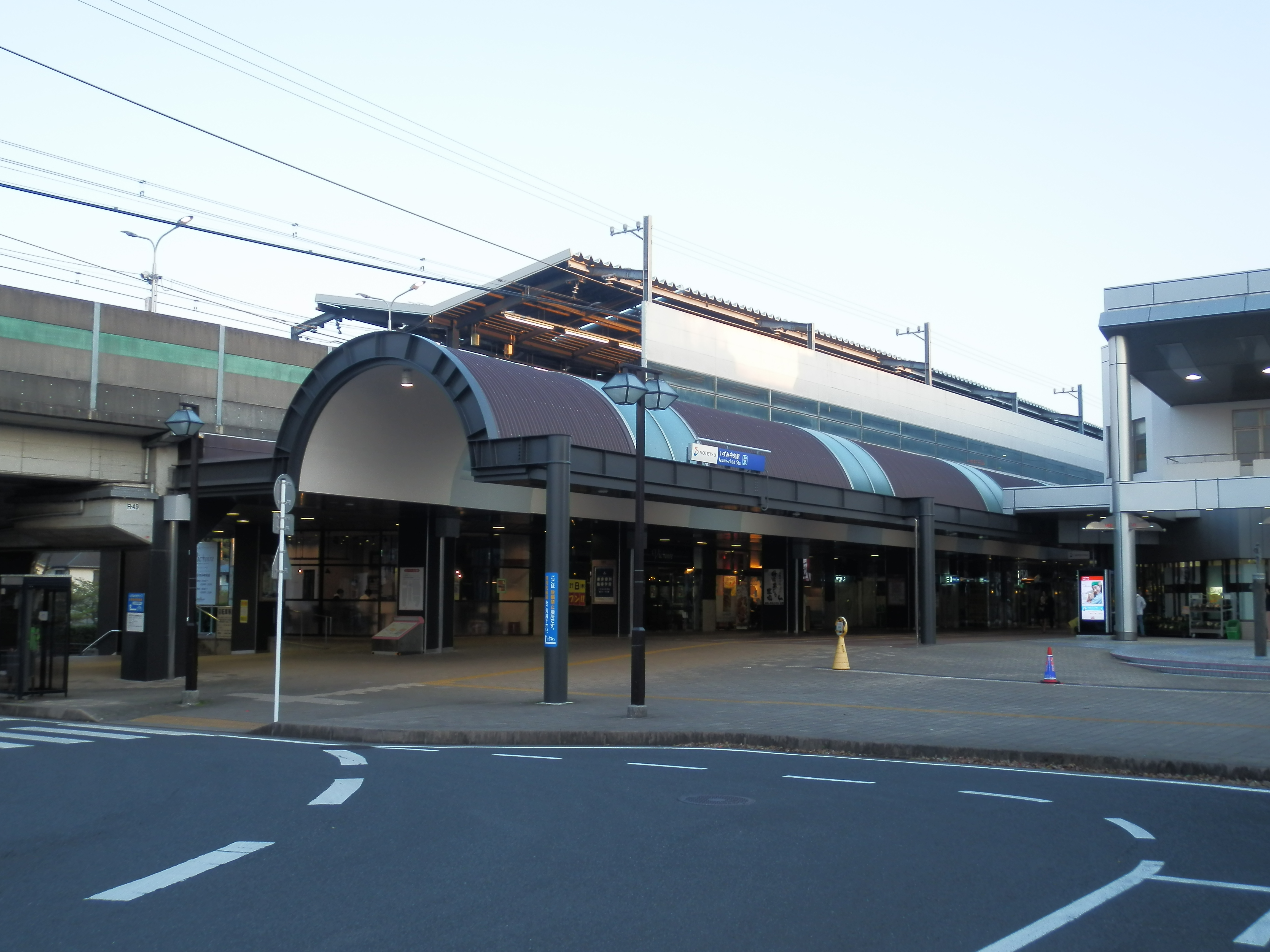 いずみ中央駅（リニューアル後）